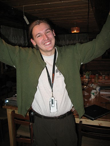 Ott Heinapuu